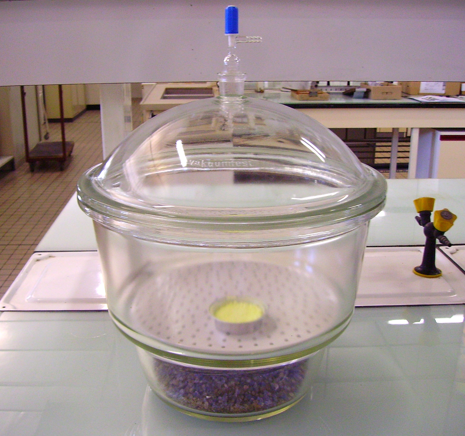 Dessiccateur de laboratoire en verre avec prise de vide à la partie supérieure. Le dessiccant (granulés bleus de gel de silice) est situé sous le disque perforé. Le produit à dessécher (soufre en poudre) est placé dans une coupelle en aluminium.